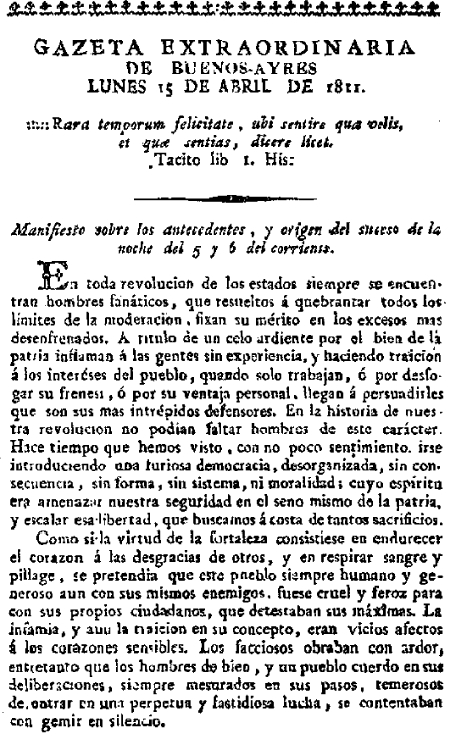 Gazeta extraordinaria del 15 de abril de 1811 acerca de la revolución de los orilleros.